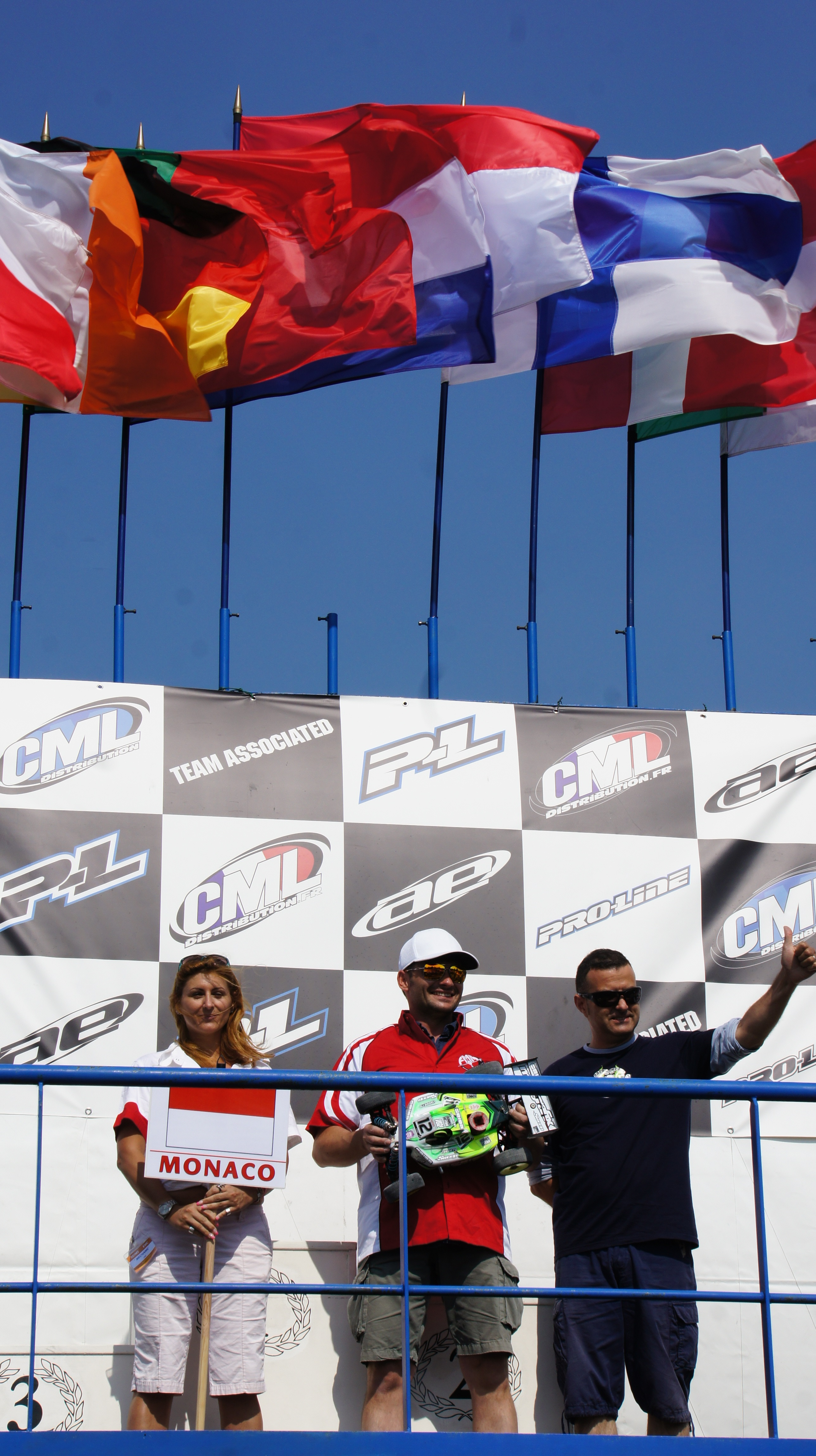 Présentation des équipes lors du Championnat d'Europe EFRA 2013 à Reims.